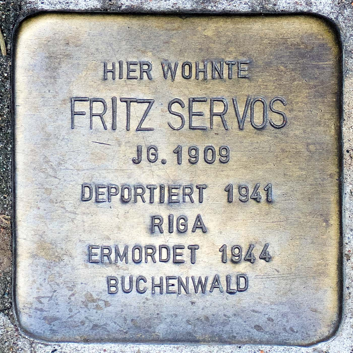 Stolperstein für Fritz Servos (Willich)